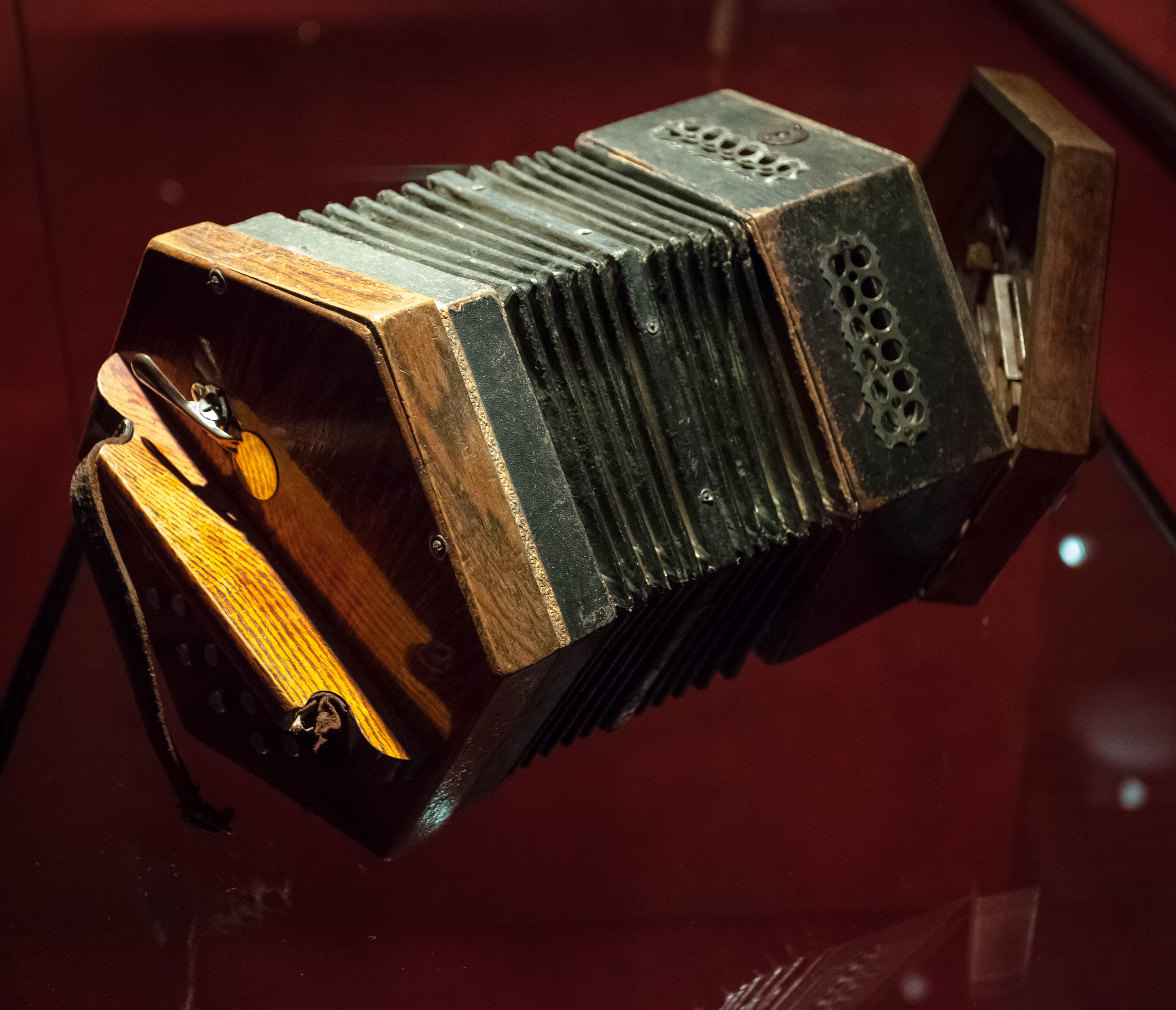 Concertina automàtica, MDMB 611